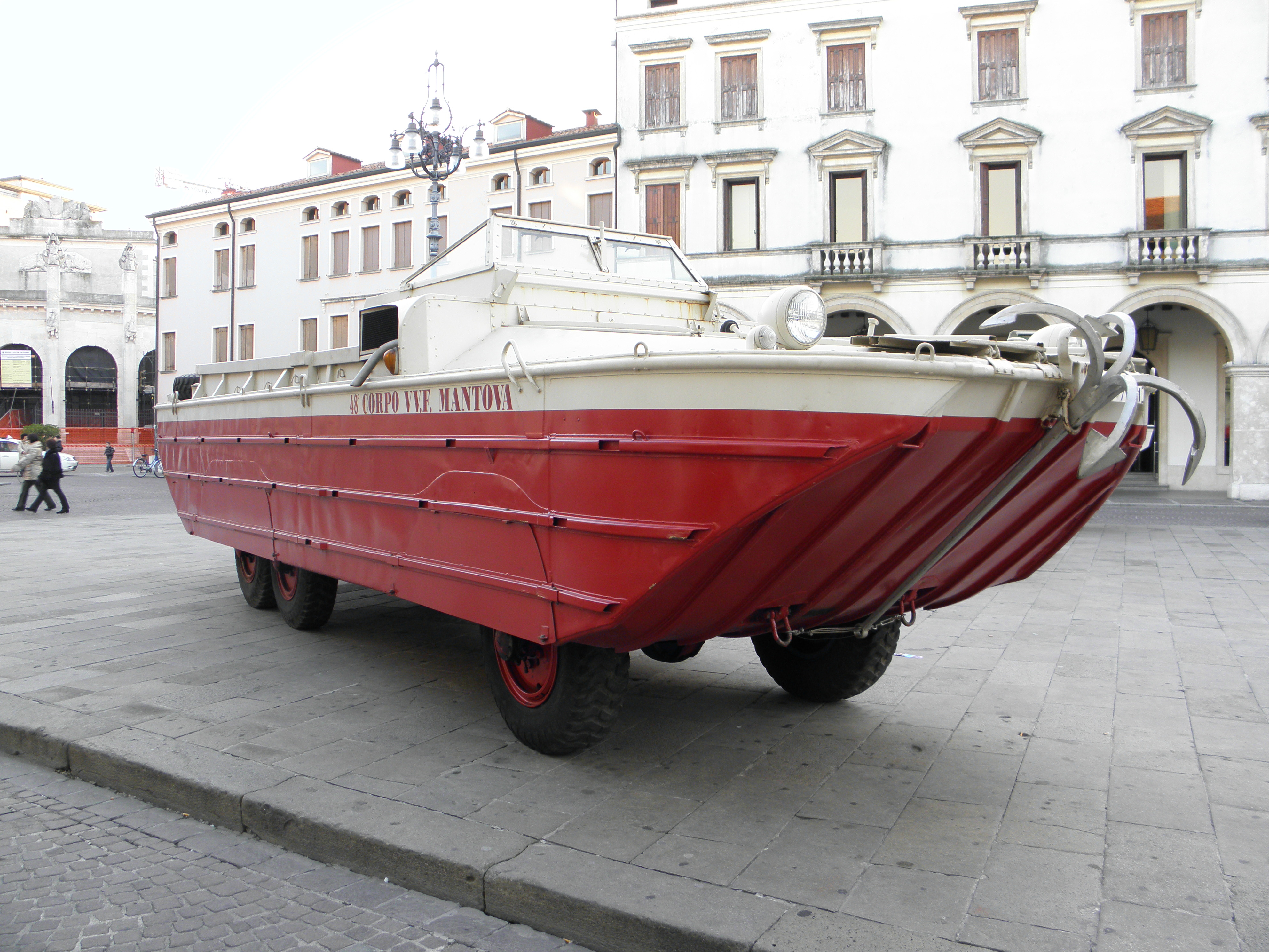 DUKW, veicolo storico dei Vigili del Fuoco. Foto scattata in occasione della manifestazione svolta a Rovigo il 13 novembre 2011 in ricordo dell'alluvione del Polesine del 1951.